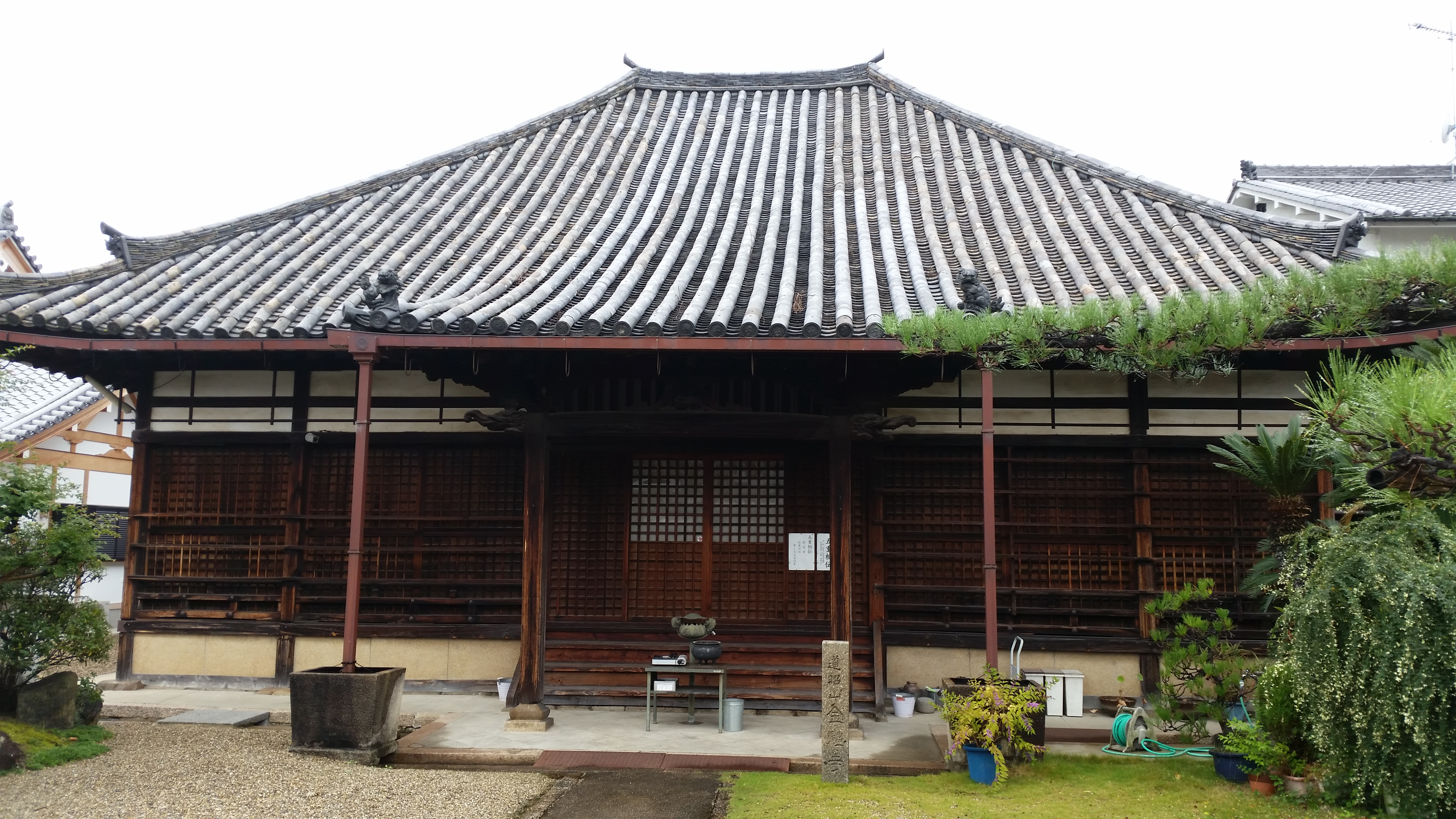 金躰寺本堂、奈良